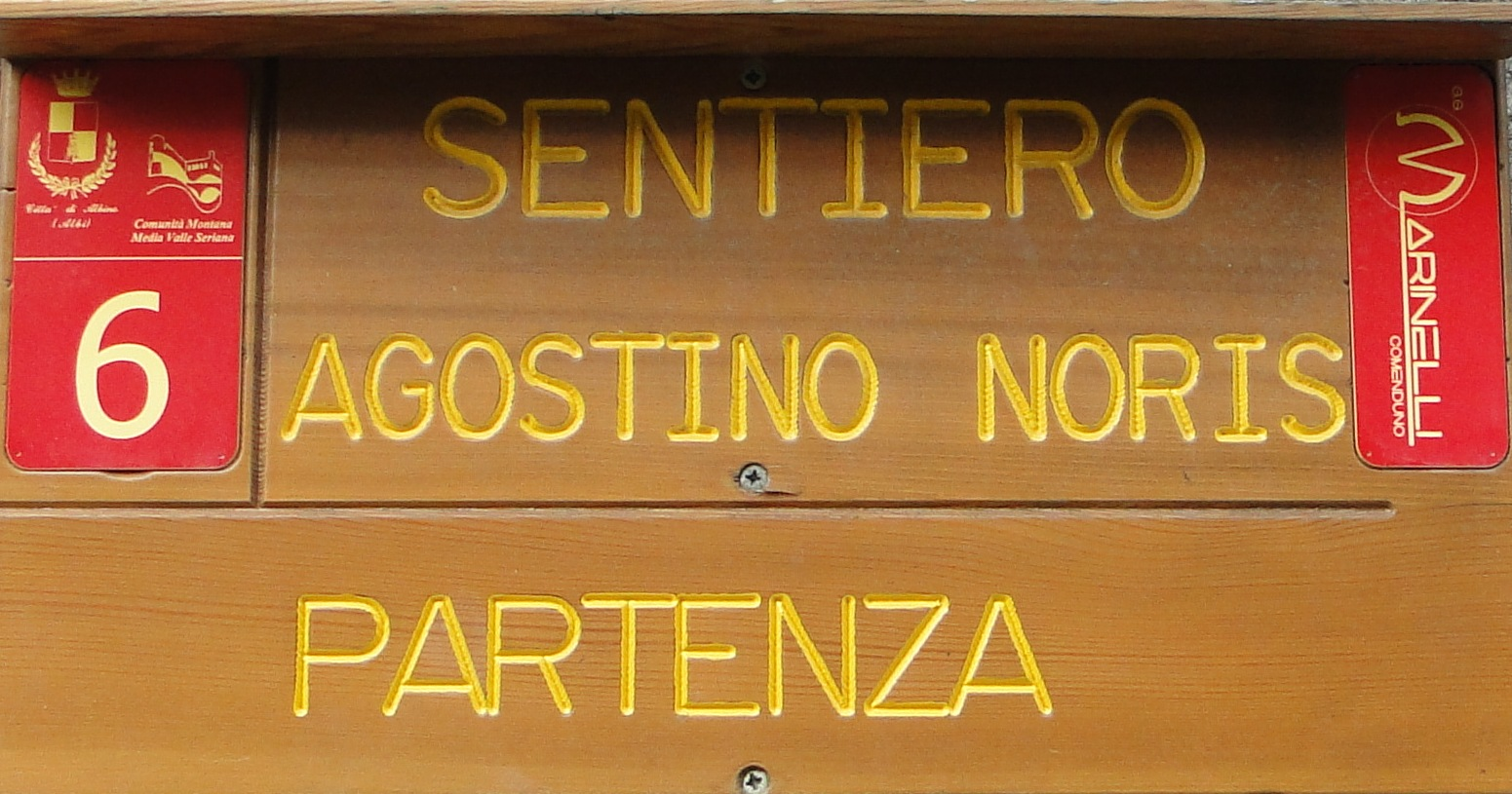 Comenduno, fraz. di Albino (BG), pannello sentiero Agostino Noris